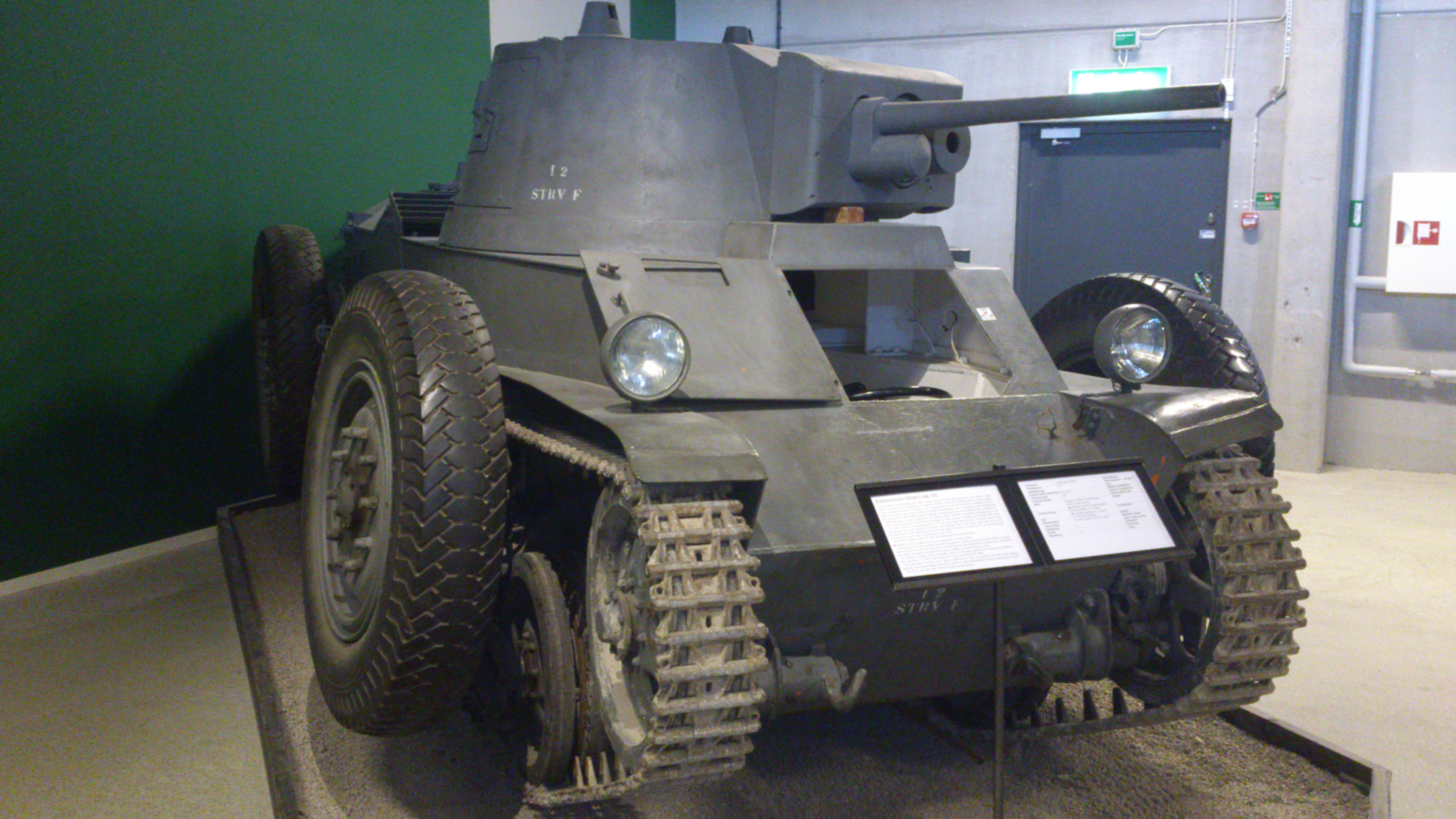 Stridsvagn FM 31 på Försvarsfordonsmuseet Arsenalen i Strängnäs